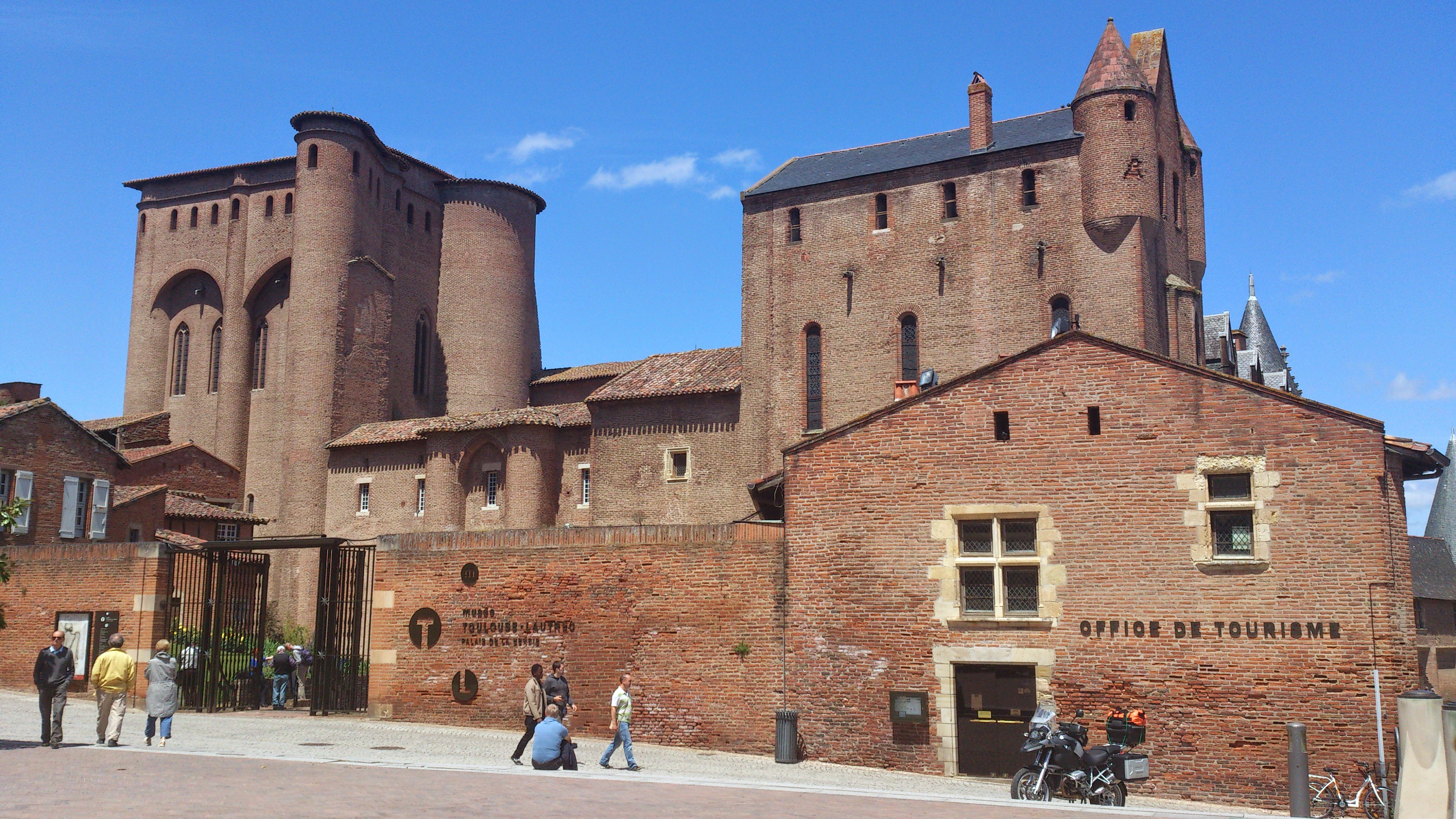 palais épiscopal Albi mai 2014